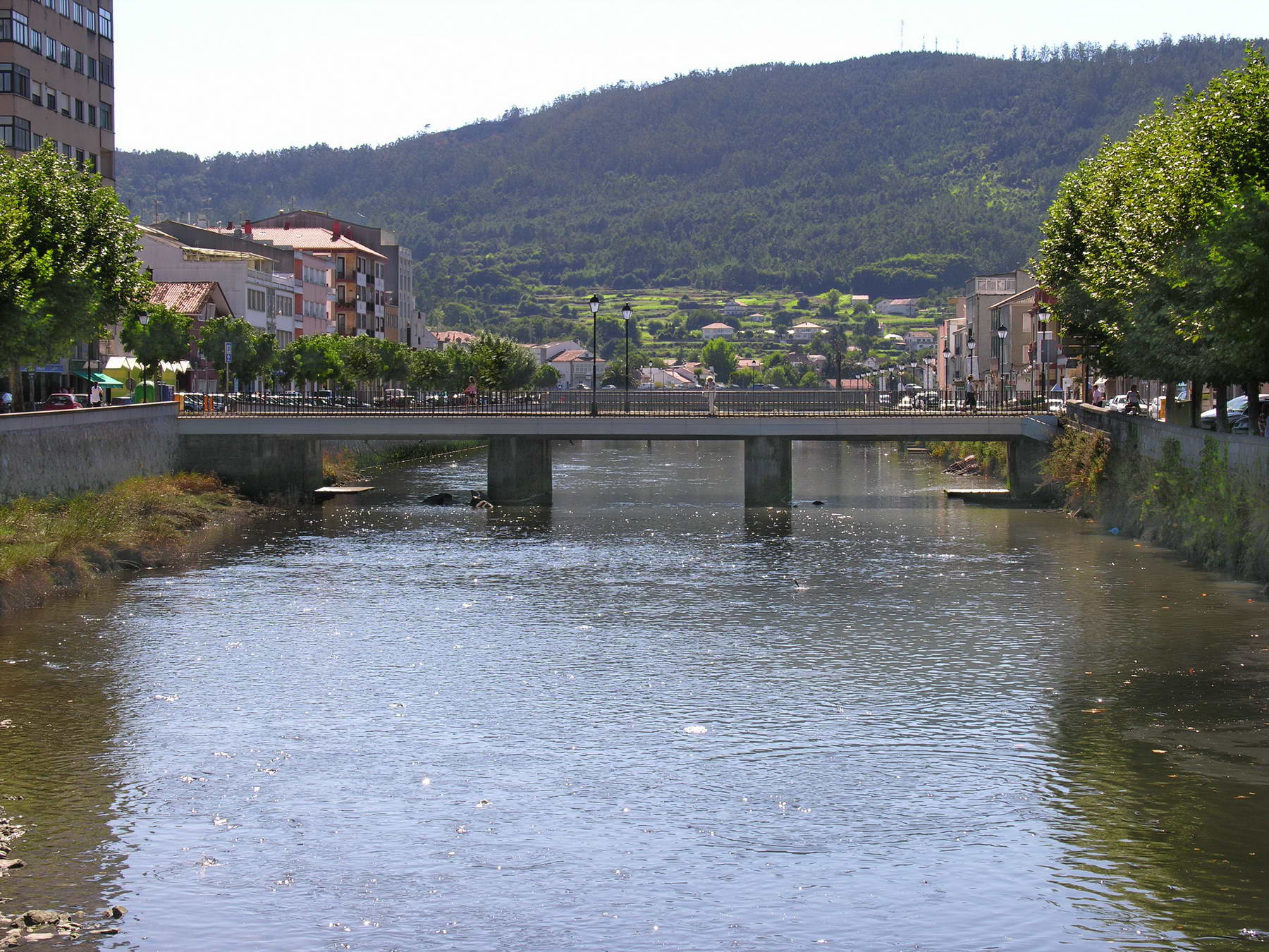 Río Traba, Noia, Galicia Publish by= Luis Miguel Bugallo Sánchez.